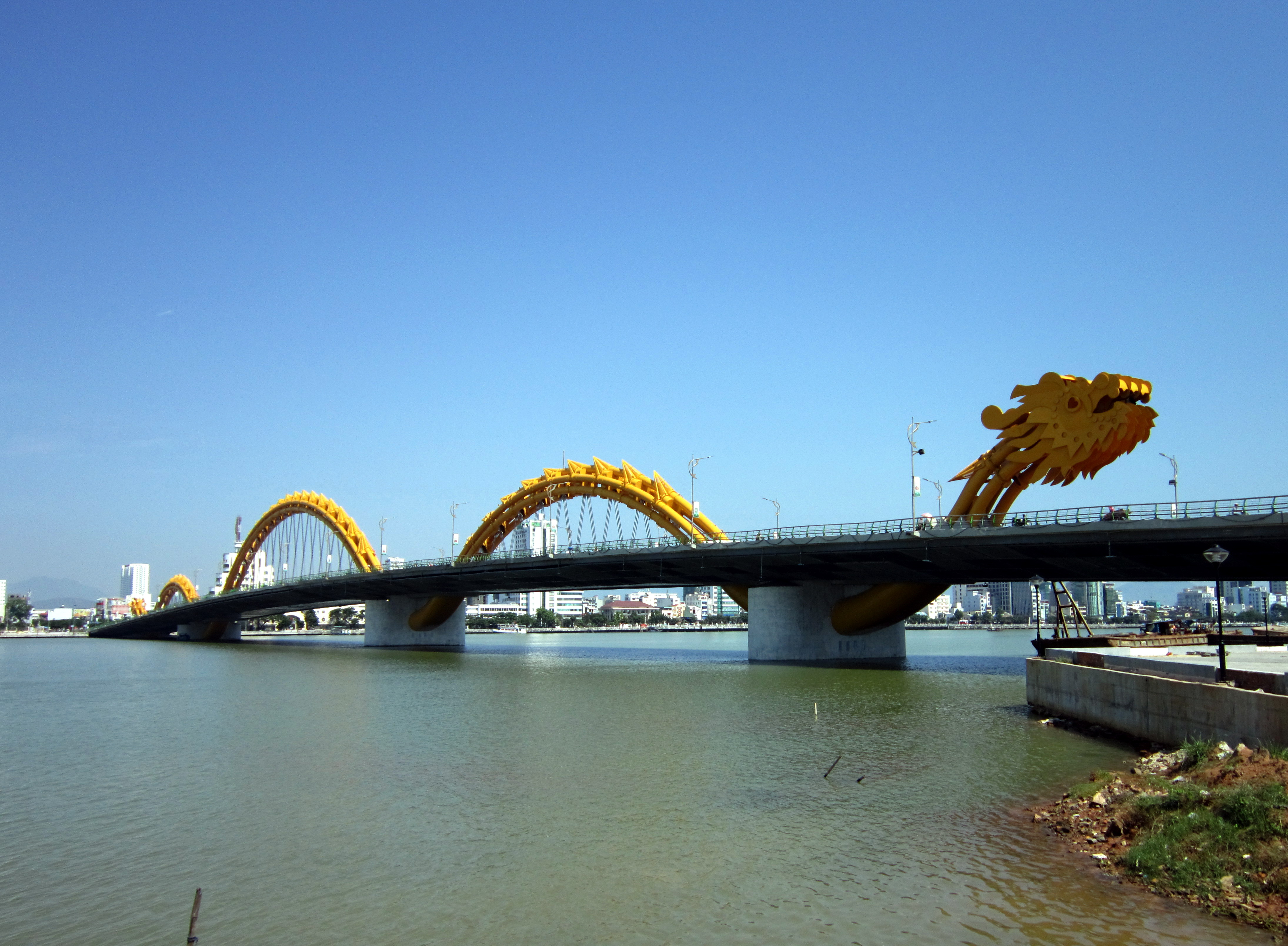 Cầu Rồng ở TP. Đà Nẵng, Việt Nam.